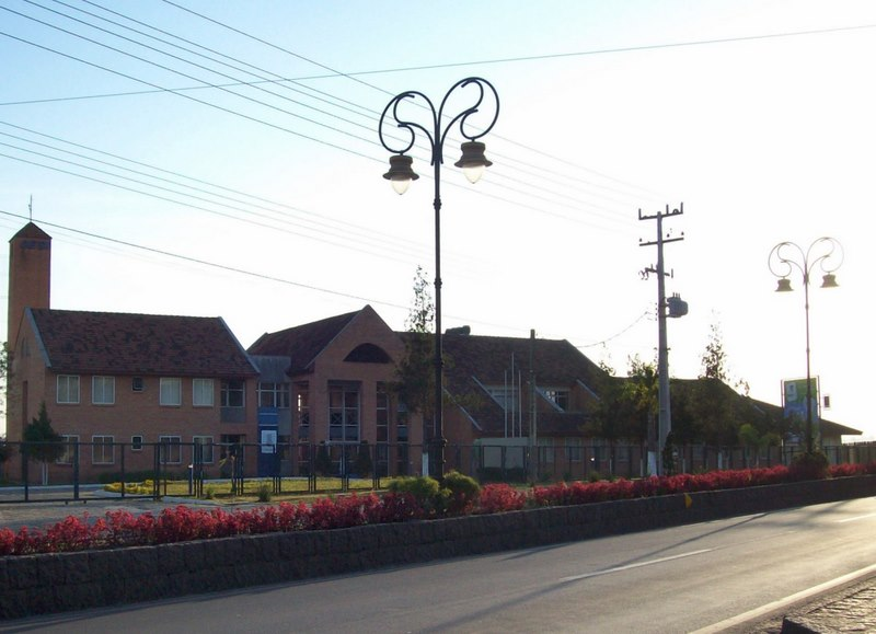 SESI em Quatro Barras (Grande Curitiba), PR, Sul do Brasil.